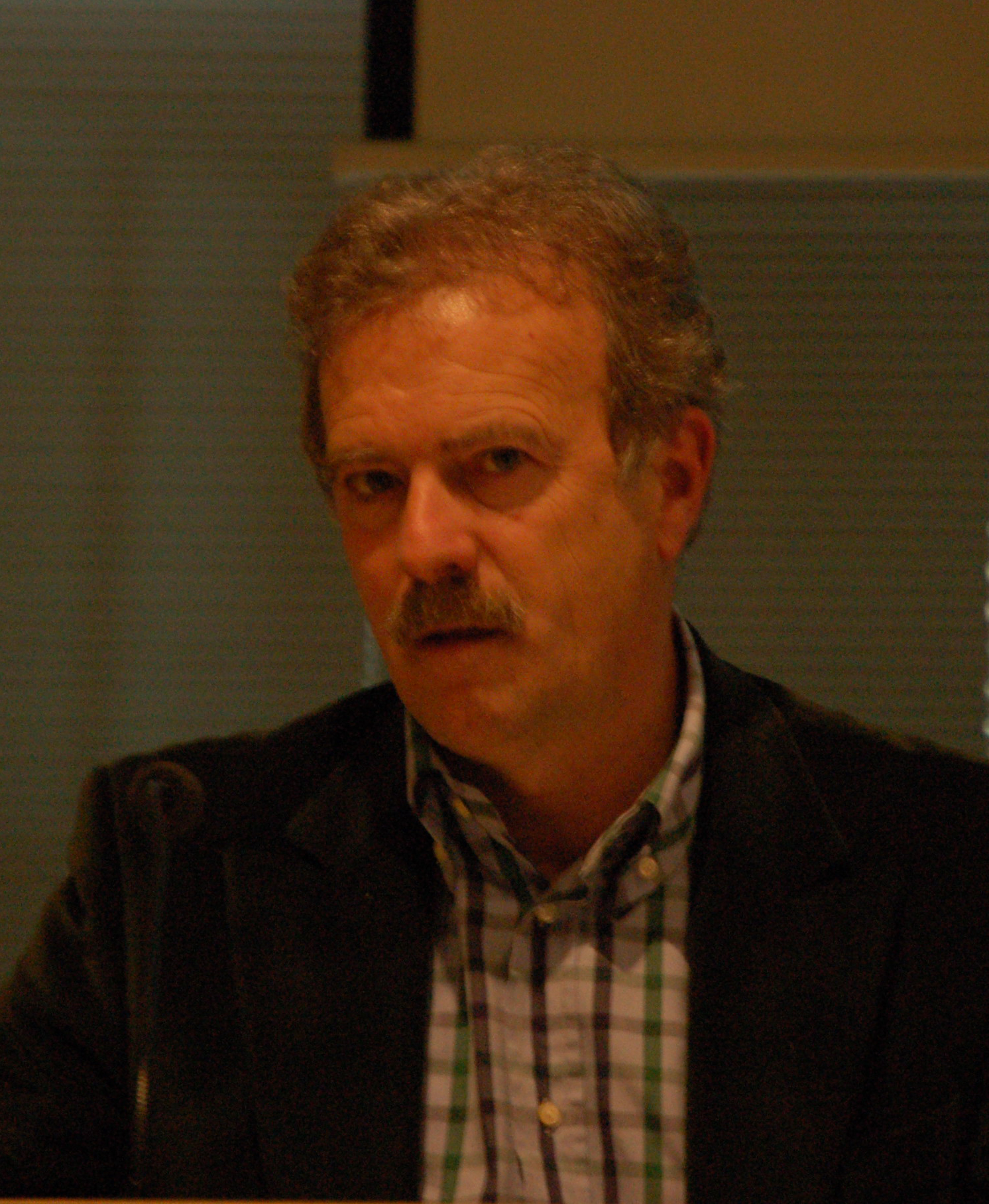 Manuel Campo Vidal no Congreso Pontes de cultura, pontes de futuro, organizado pola asociación Ponte... nas ondas!, celebrado no Verbum - Casa das palabras de Vigo